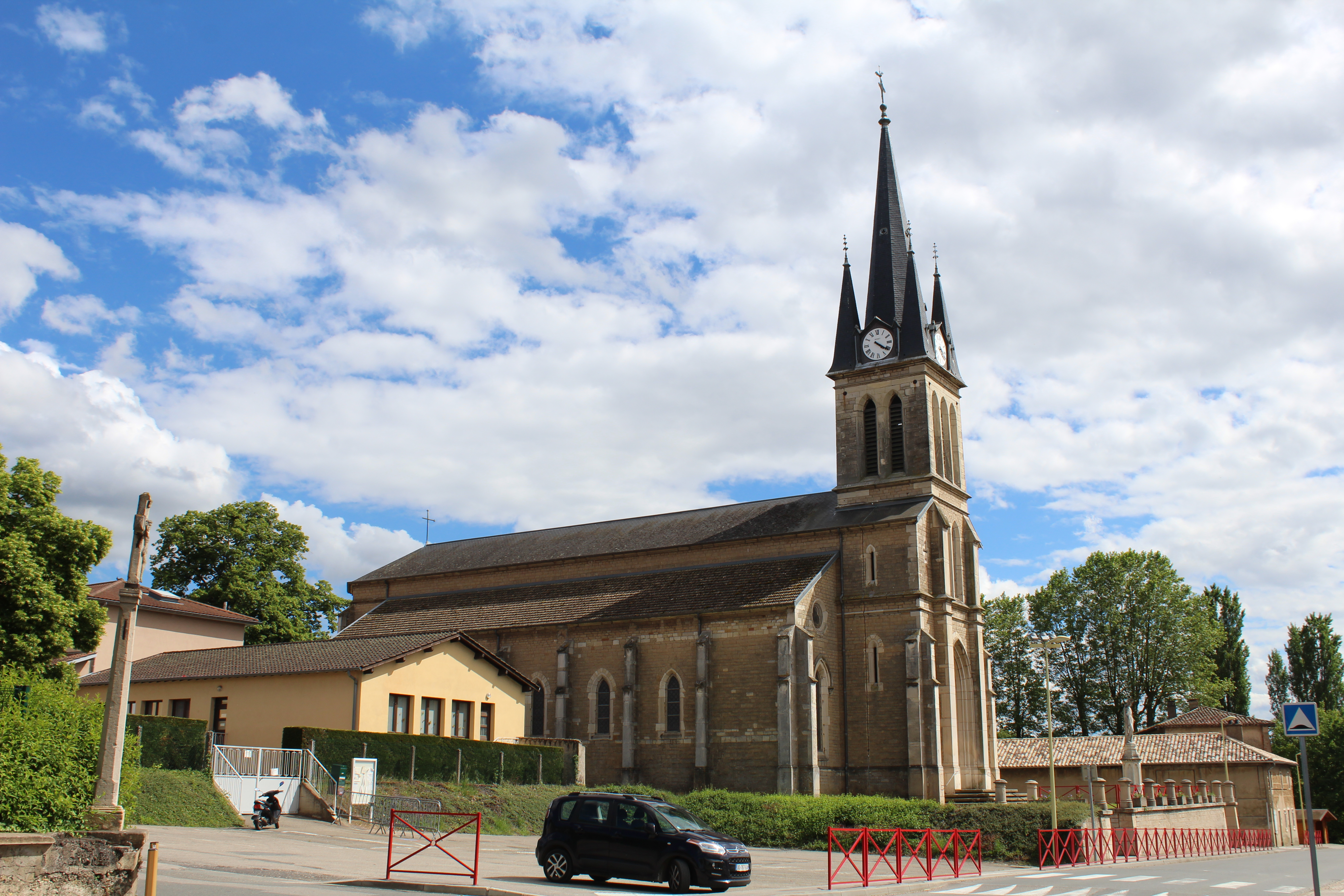 Église Saint-Marcellin de Guéreins